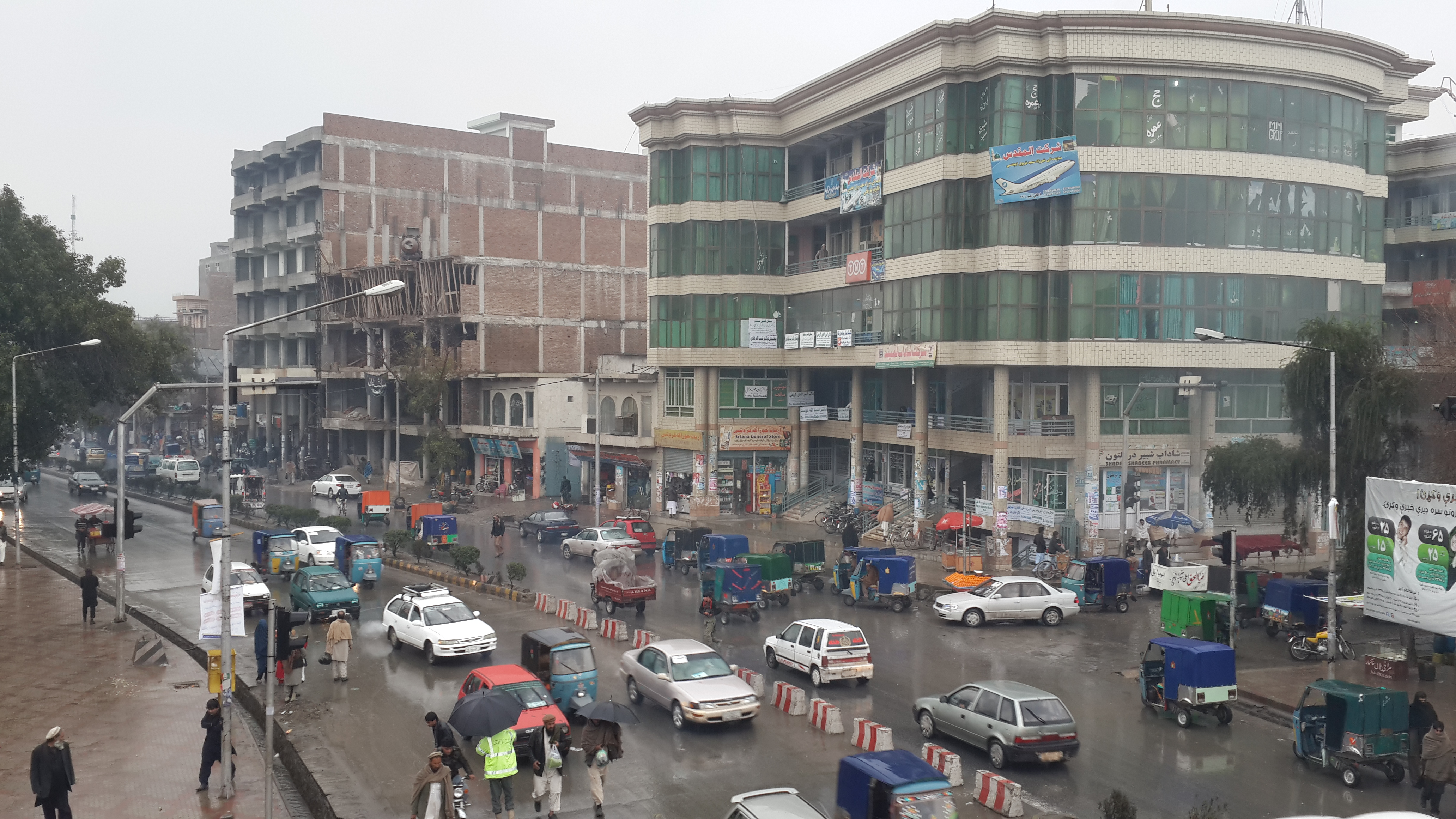 پښتو: Jalalabad city